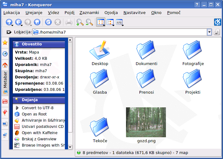 Konqueror file manager